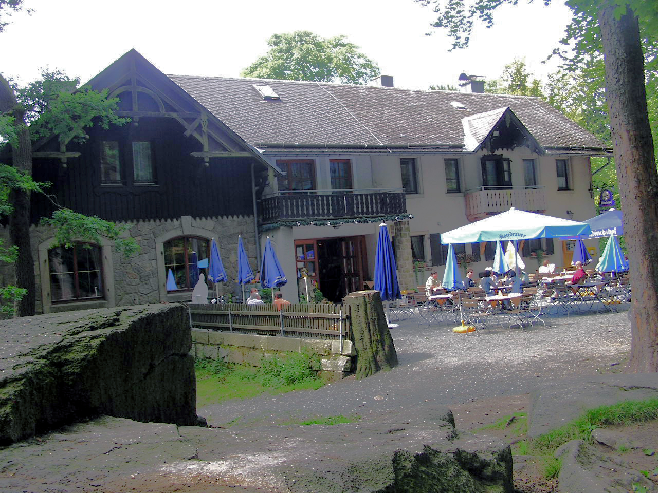 Description: Großer Waldstein, Waldsteinhaus Source: selbst fotografiert Date: 19. August 2005 Author: Schubbay Großer Waldstein